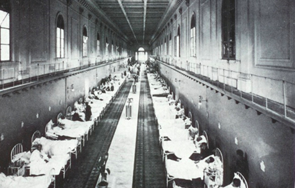 San Giacomo degli Incurabili, Roma: Galleria Genga